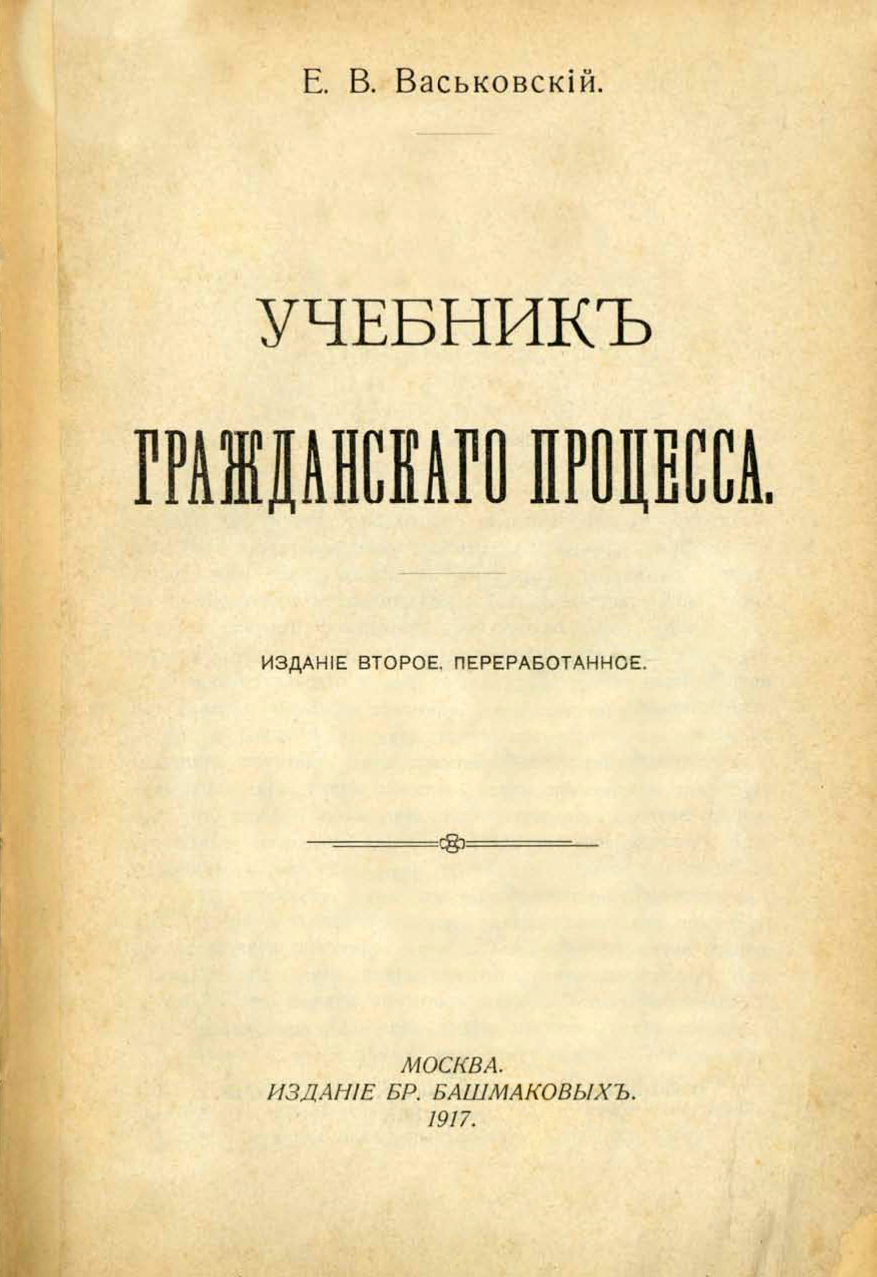 Учебник гражданского процесса Е. В. Васьковского